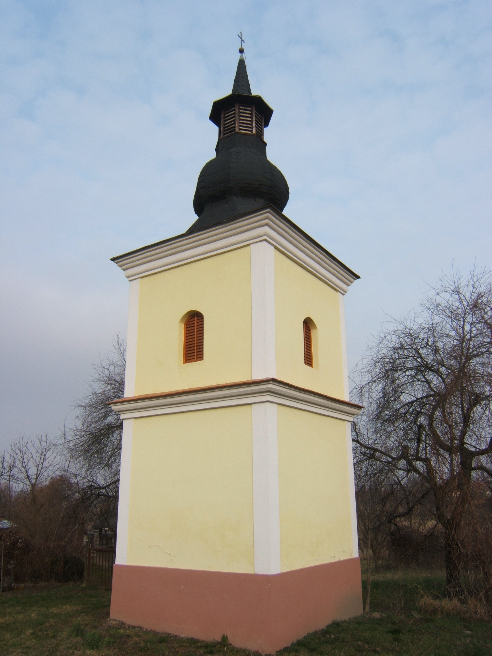 Gyugy, harangtorony